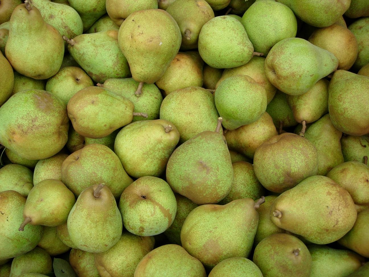 Comice peren, Doyenné du Comice